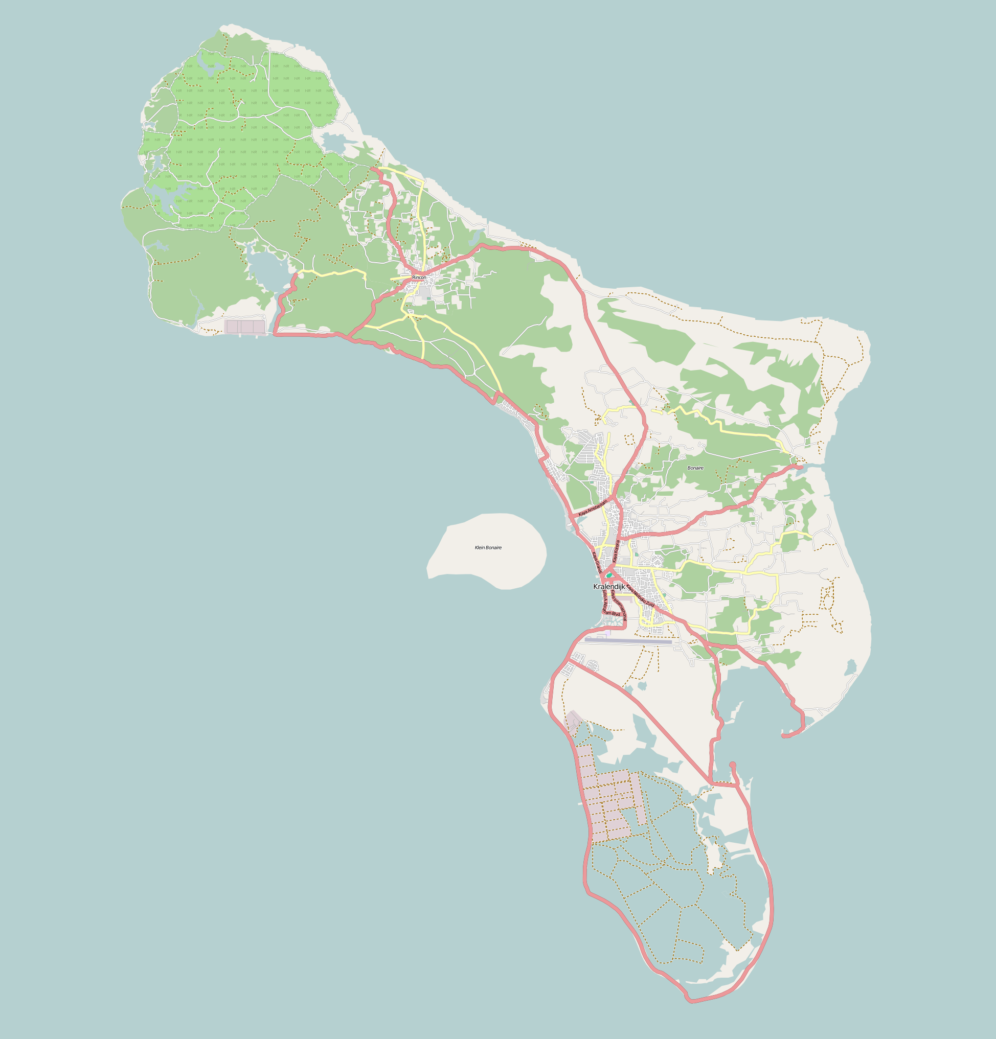 Bonaire